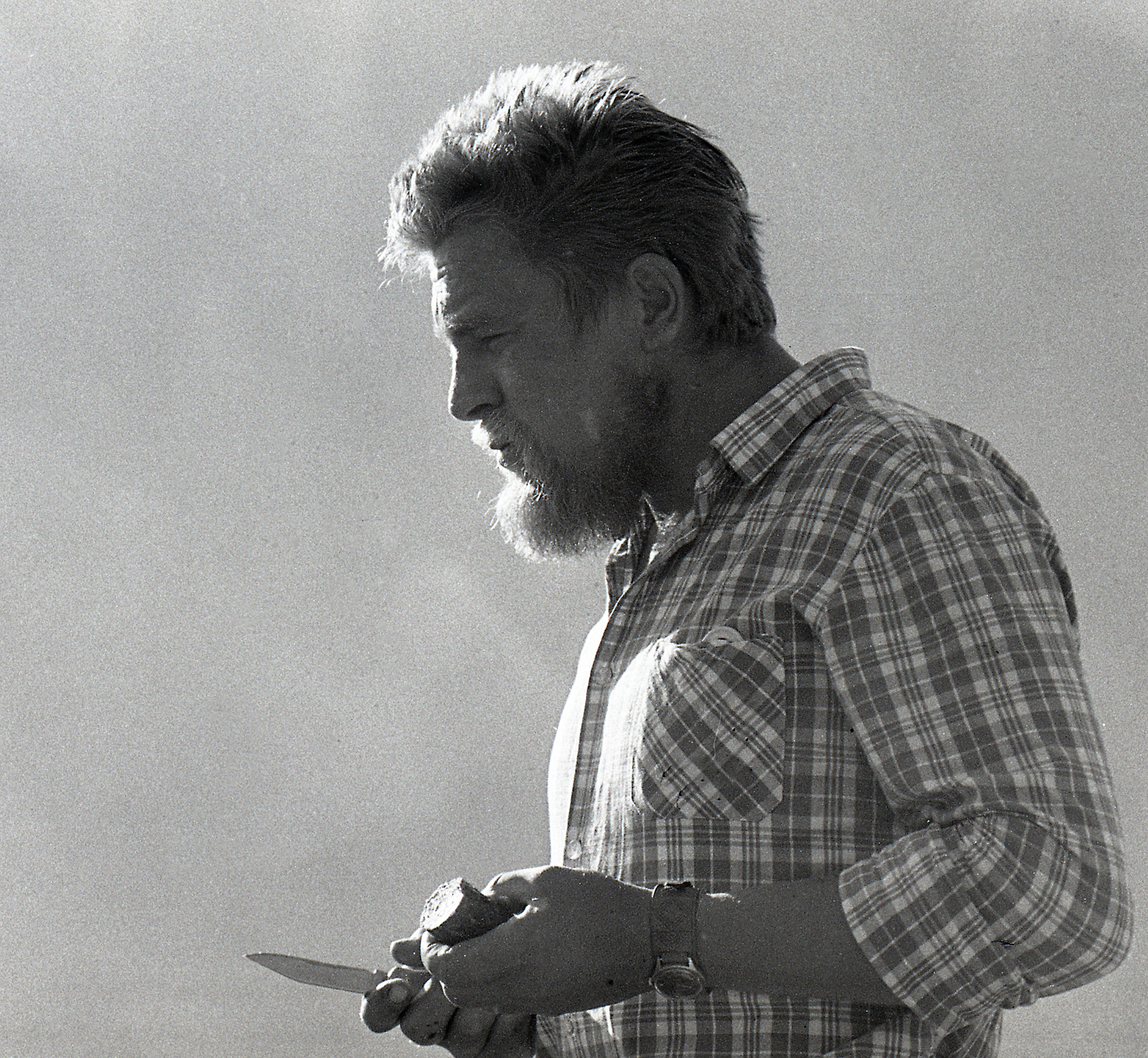 Enn Branno